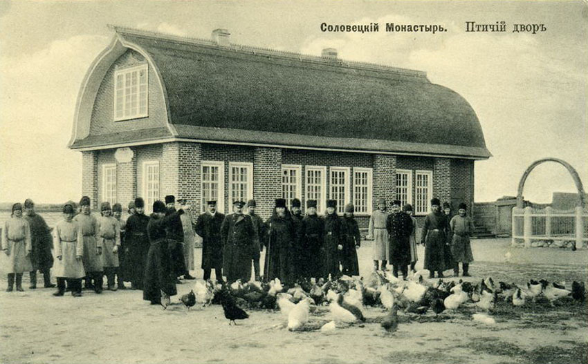 Соловецкий монастырь. Птичий двор.